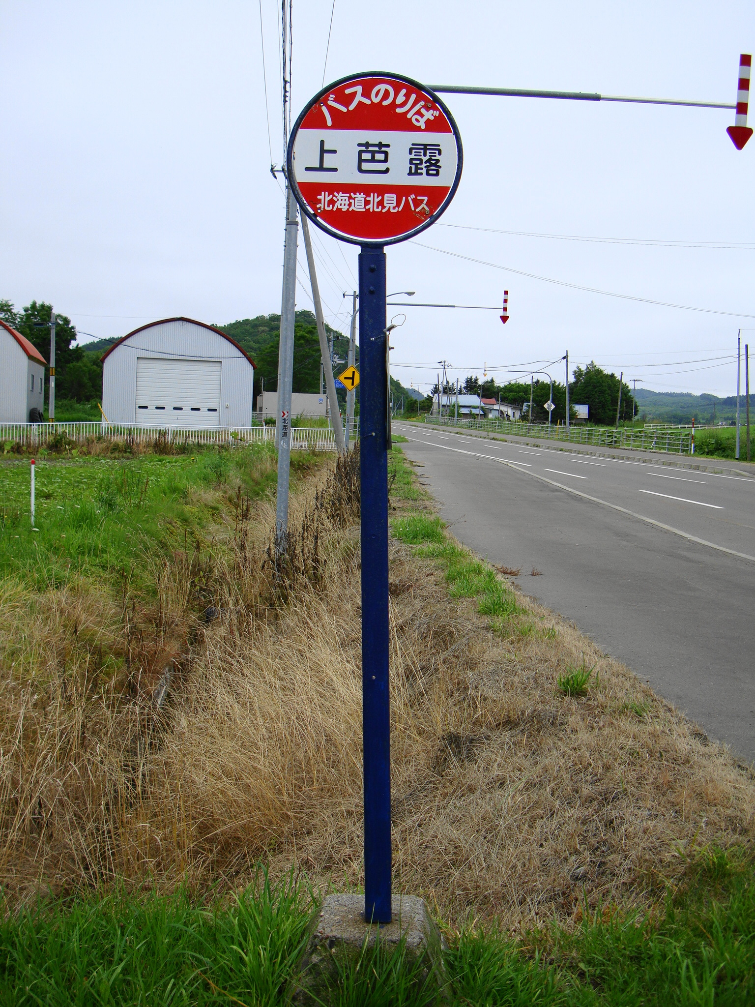 "Kami-Barō" Bus stop